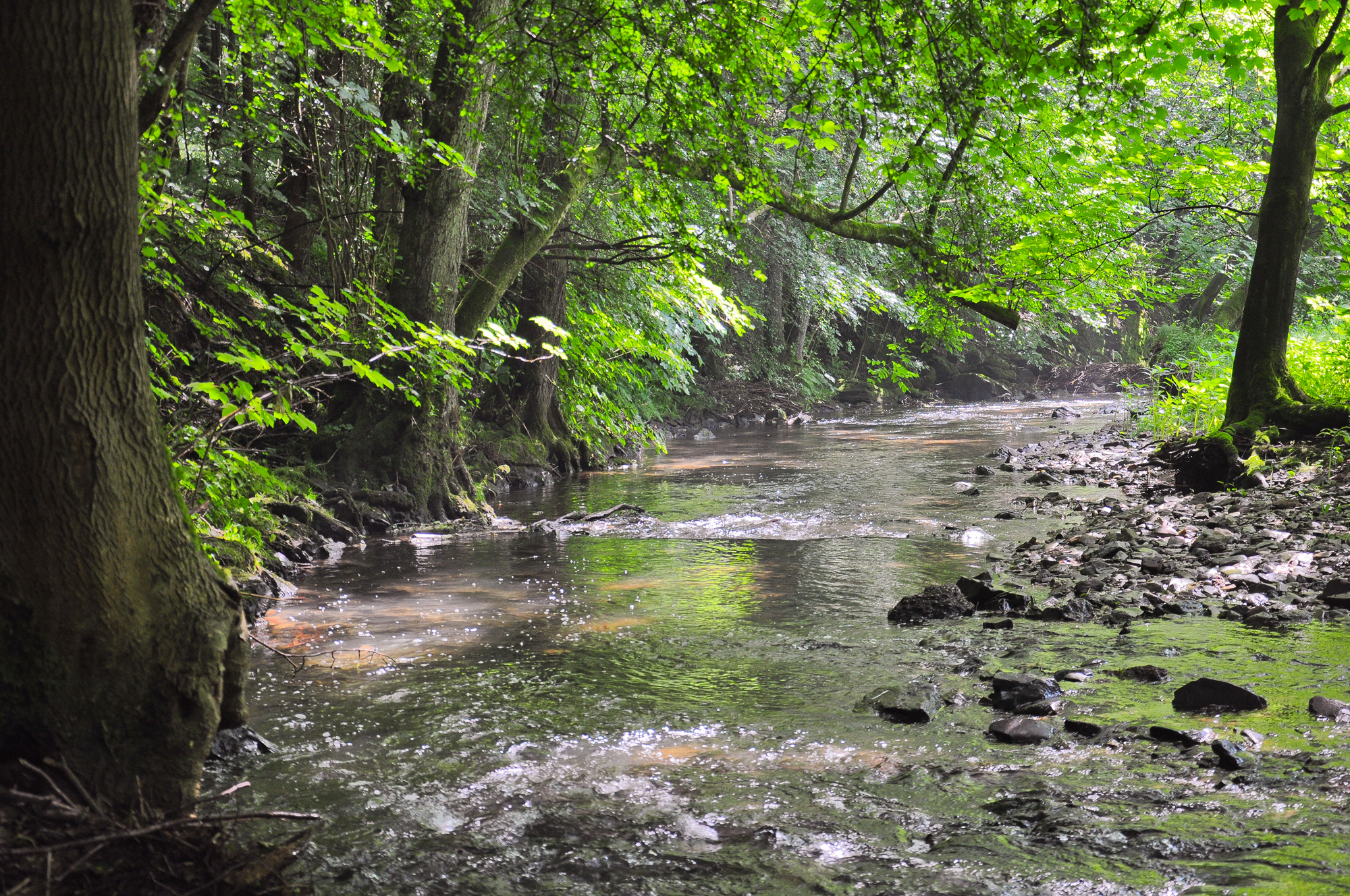 Idylle am Morsbach in Remscheid; Naturschutzgebiet „Unteres Morsbachtal mit Hölterfelder Siefen und Fürberger Bachtal“ (NSG RS-021)